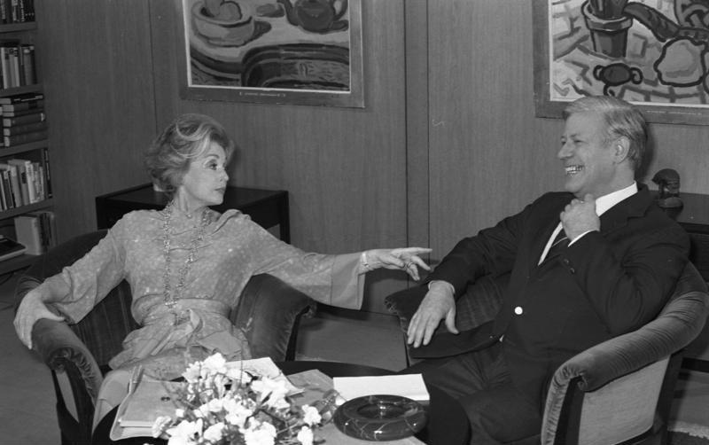 Fernsehinterview des Bundeskanzlers mit Lilli Palmer